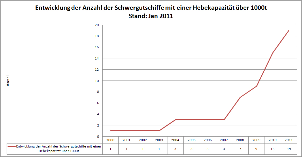 Entwicklung der weltweiten Schwergutflotte mit einer Hebefähigkeit über 1000t SWL